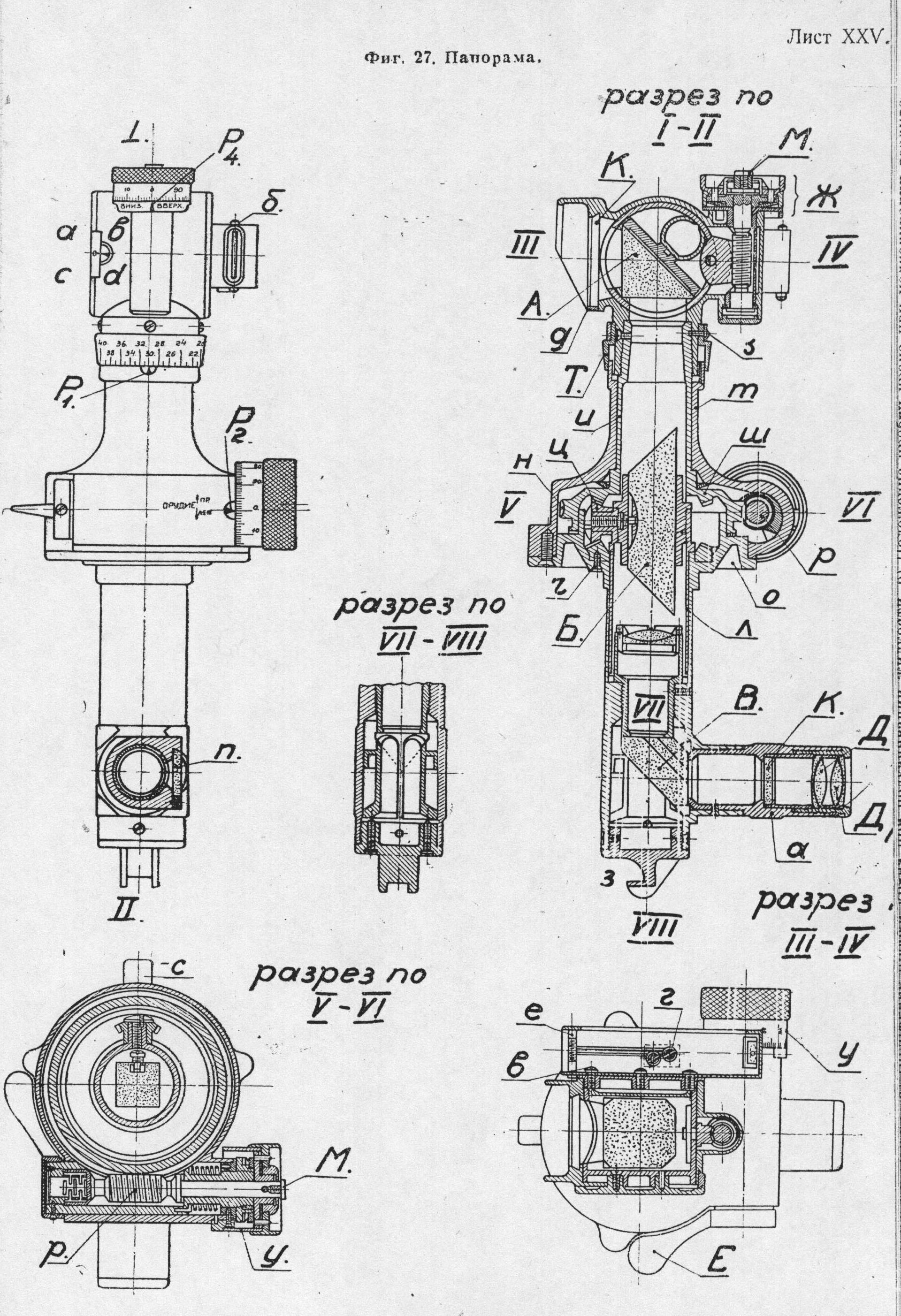 Панорама 76-мм полковой пушки обр.1927 г.